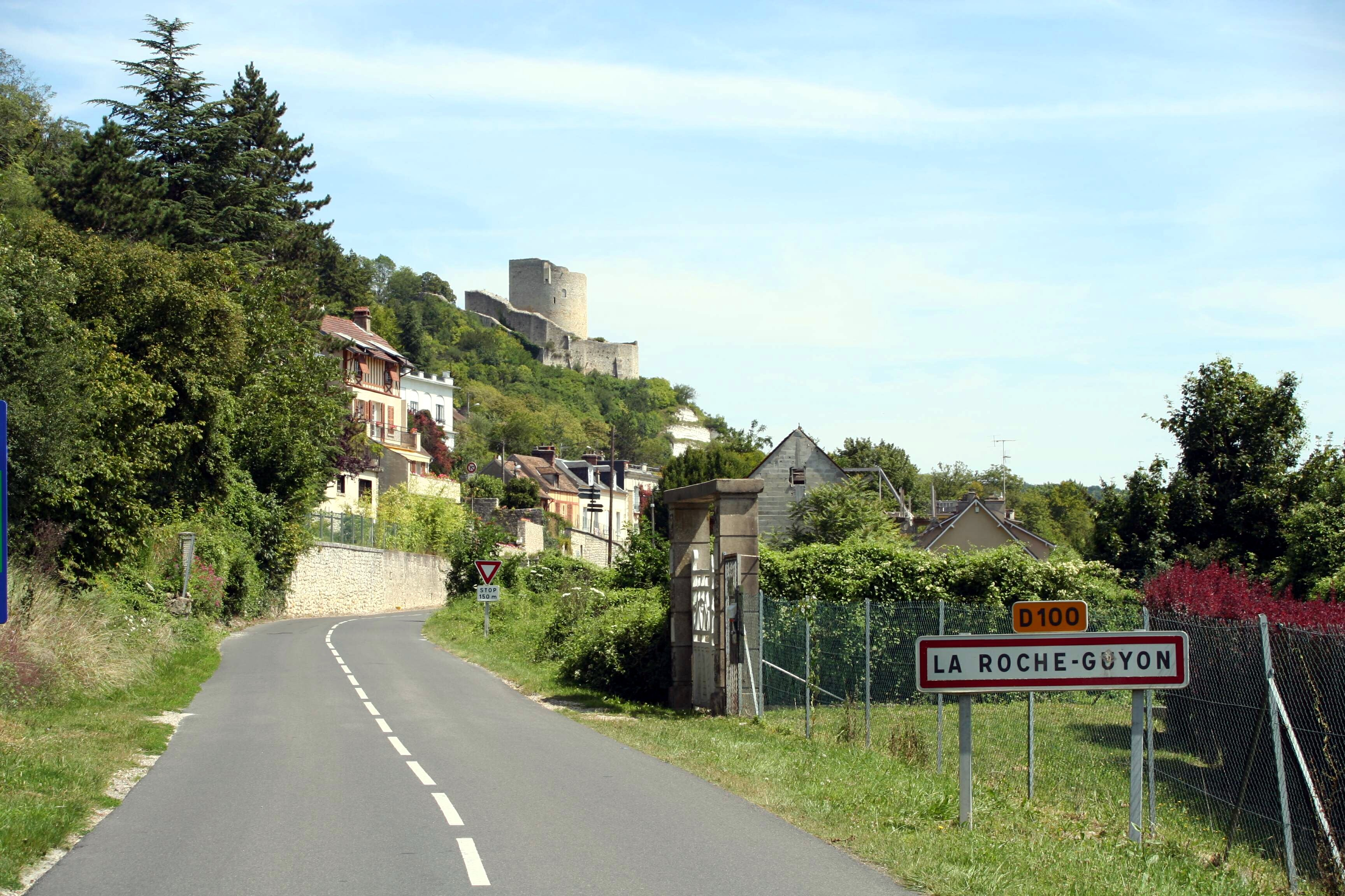 Vue générale, la Roche-Guyon, Val-d'Oise (France)